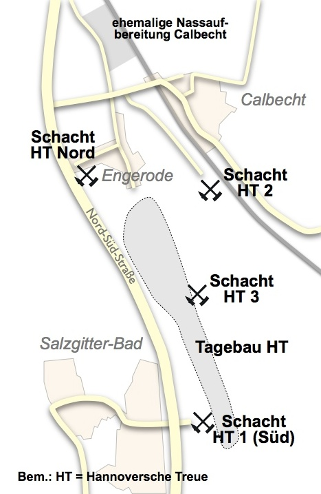 Karte der Erzbergbau-Schachtanlagen des Bergwerks Hannoversche Treue. Die Karte zeigt die Lage der Schachtanlagen des Eisenerzbergwerks Hannoversche Treue aus der Zeit nach 1938. Um eine Orientierung zu erleichtern, wurde dem Plan eine aktuelle Straßenkarte unterlegt.